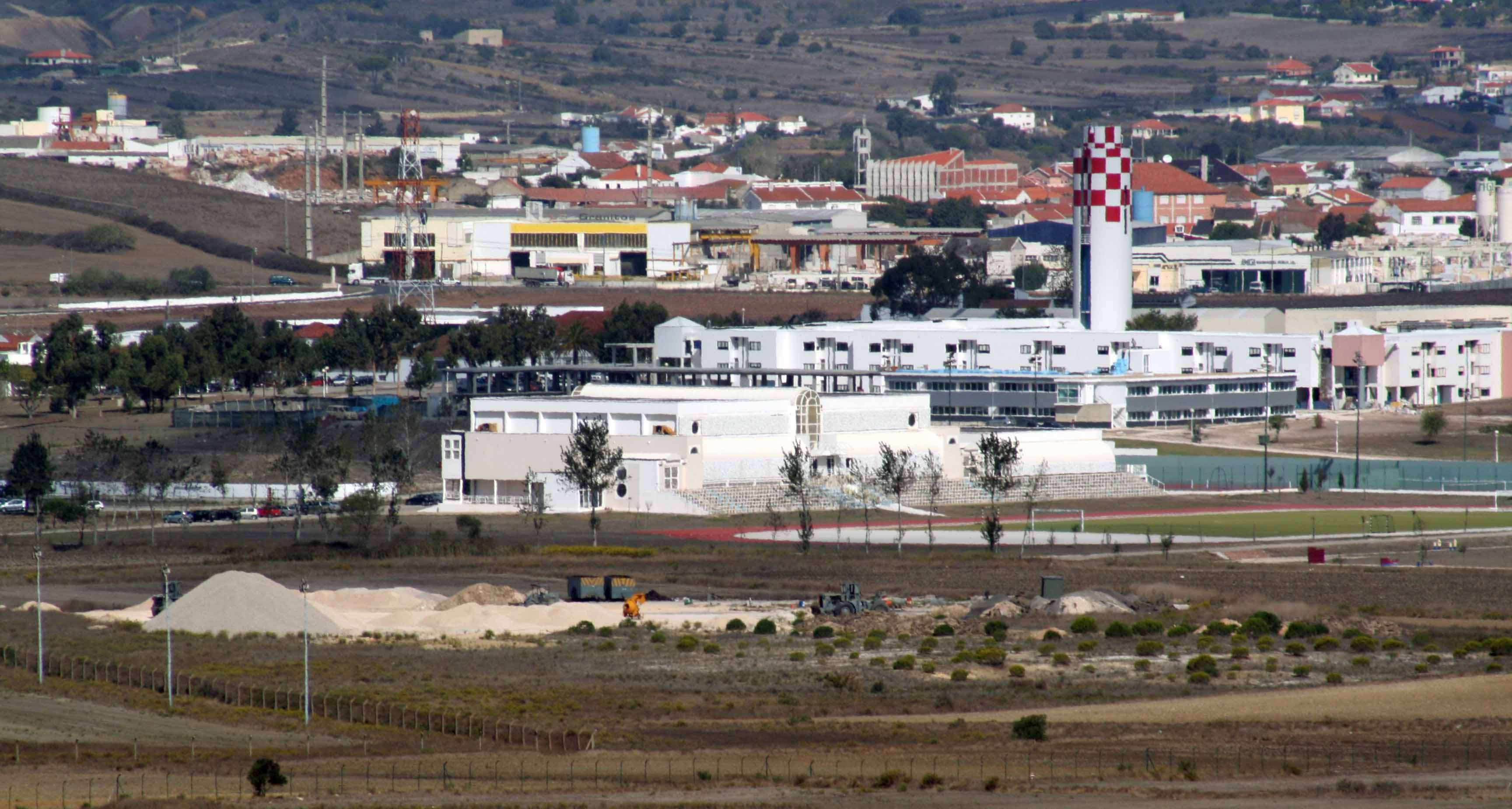 Description Portuguese Air Force Academy